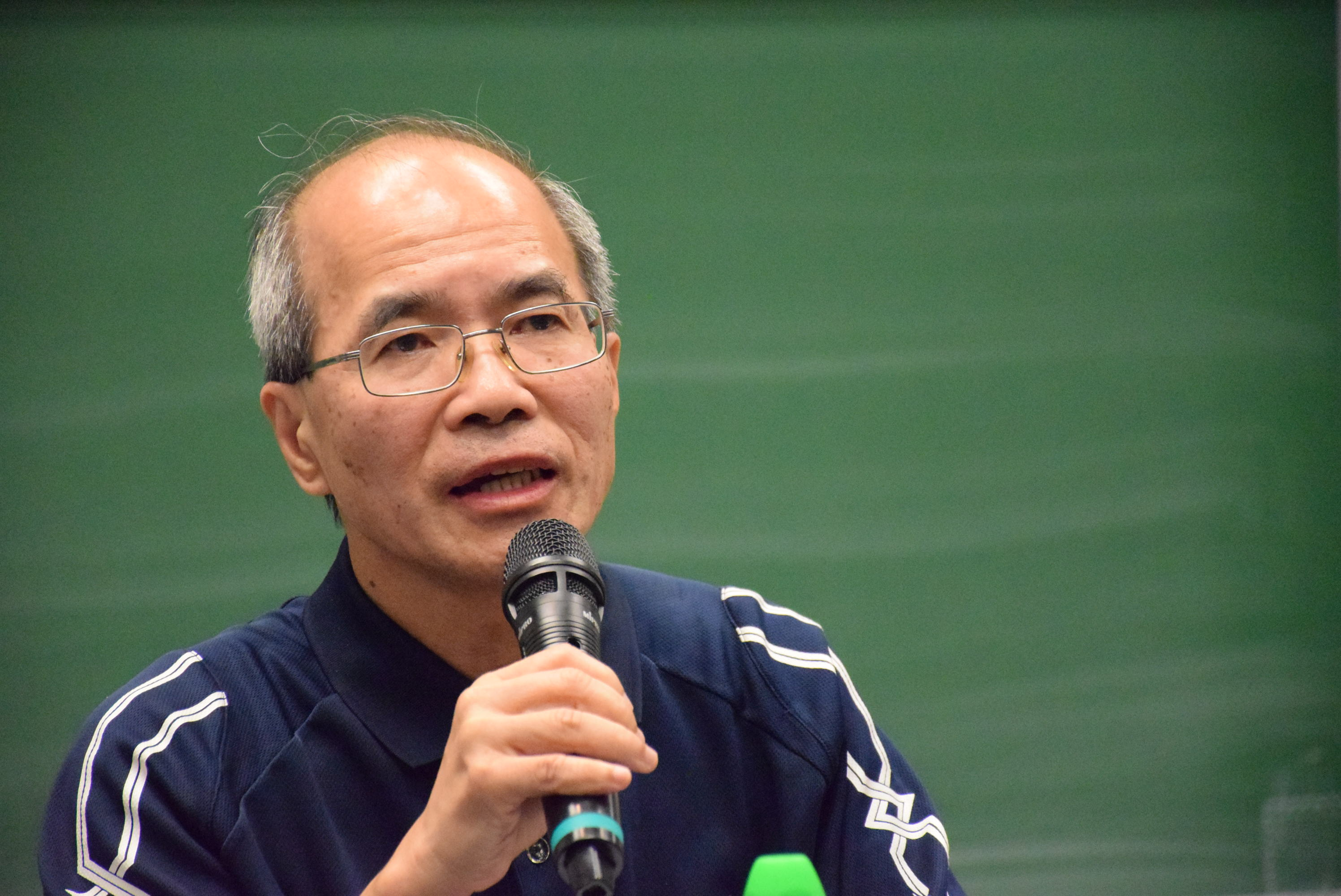 中文（台灣）: 時事評論員劉銳紹 （美國之音湯惠芸拍攝）